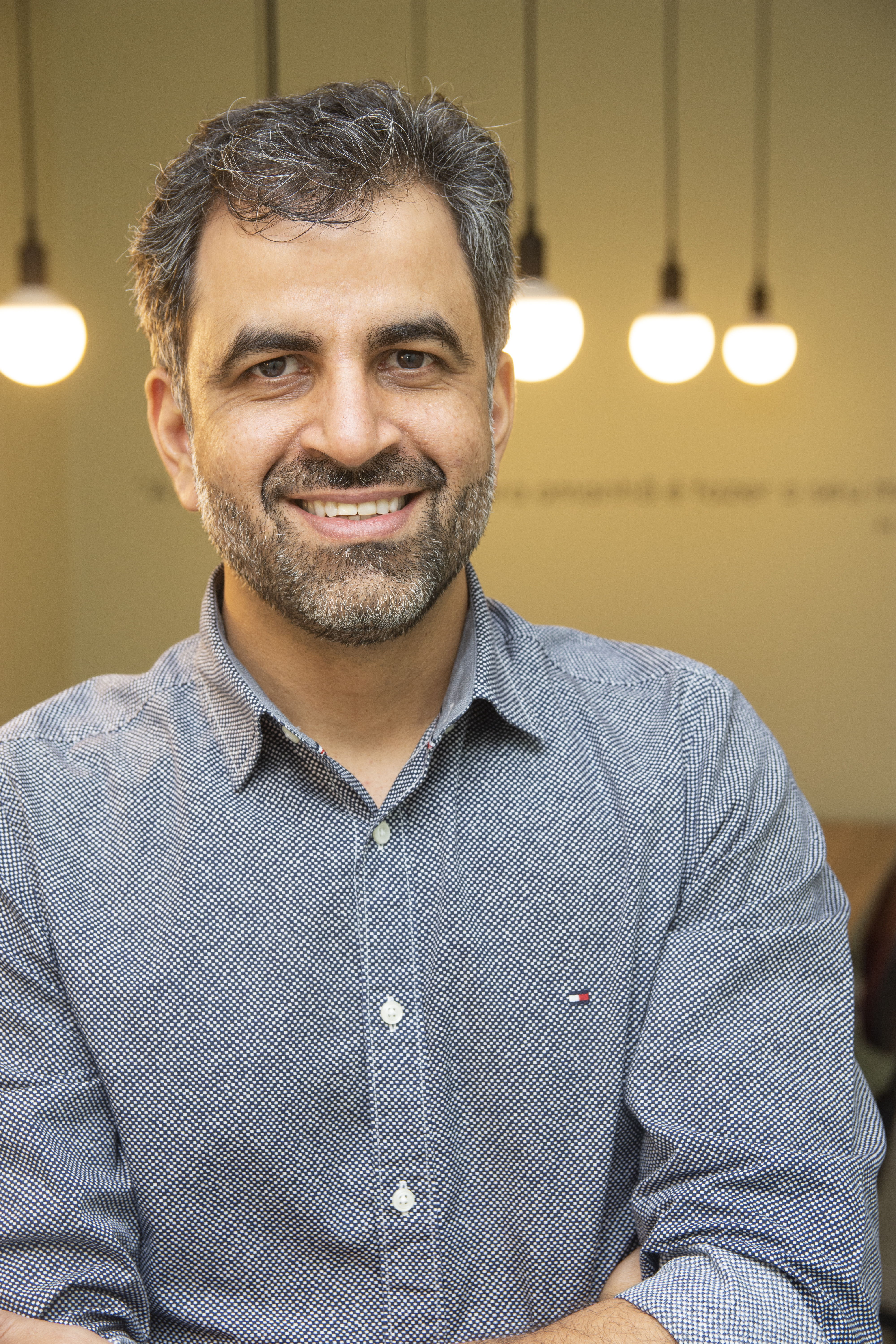 Marcelo Prata, fundador do Canal do Crédito e da Resale.